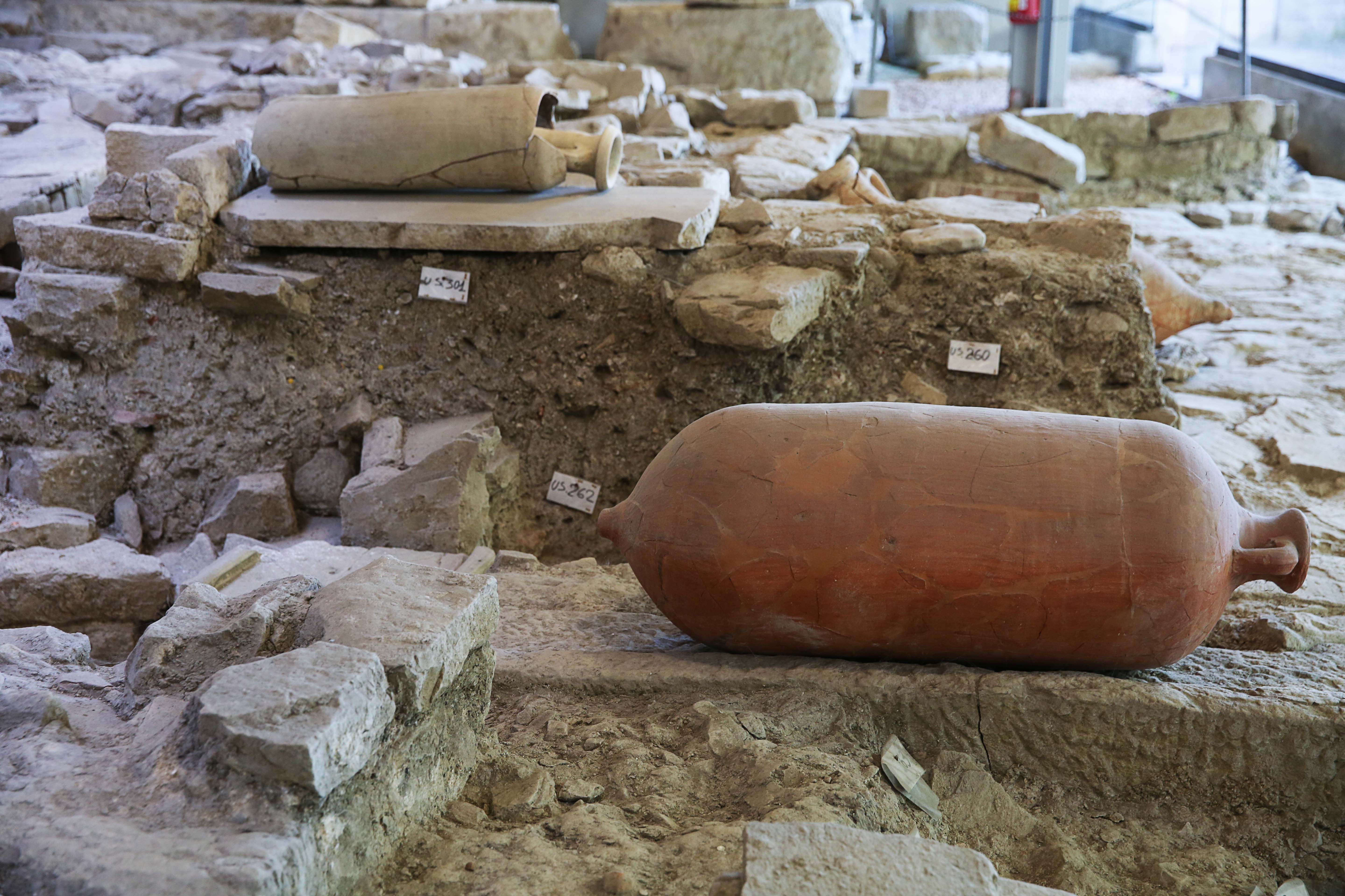 Antiquarium e mura This is a photo of a monument which is part of cultural heritage of Italy.